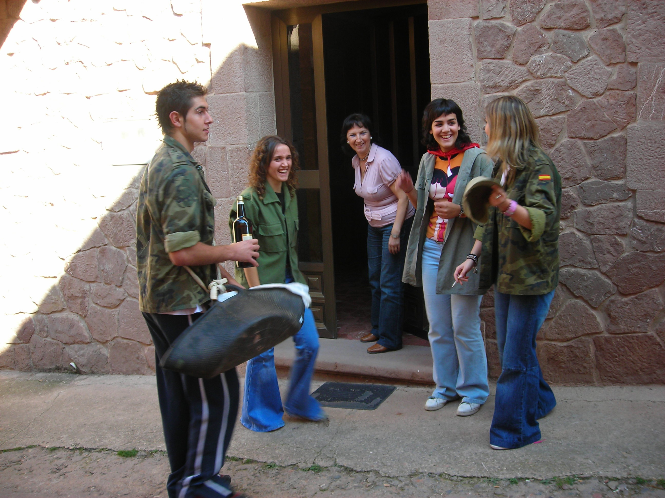 Grupo de quintos en 'Las Vueltas'.